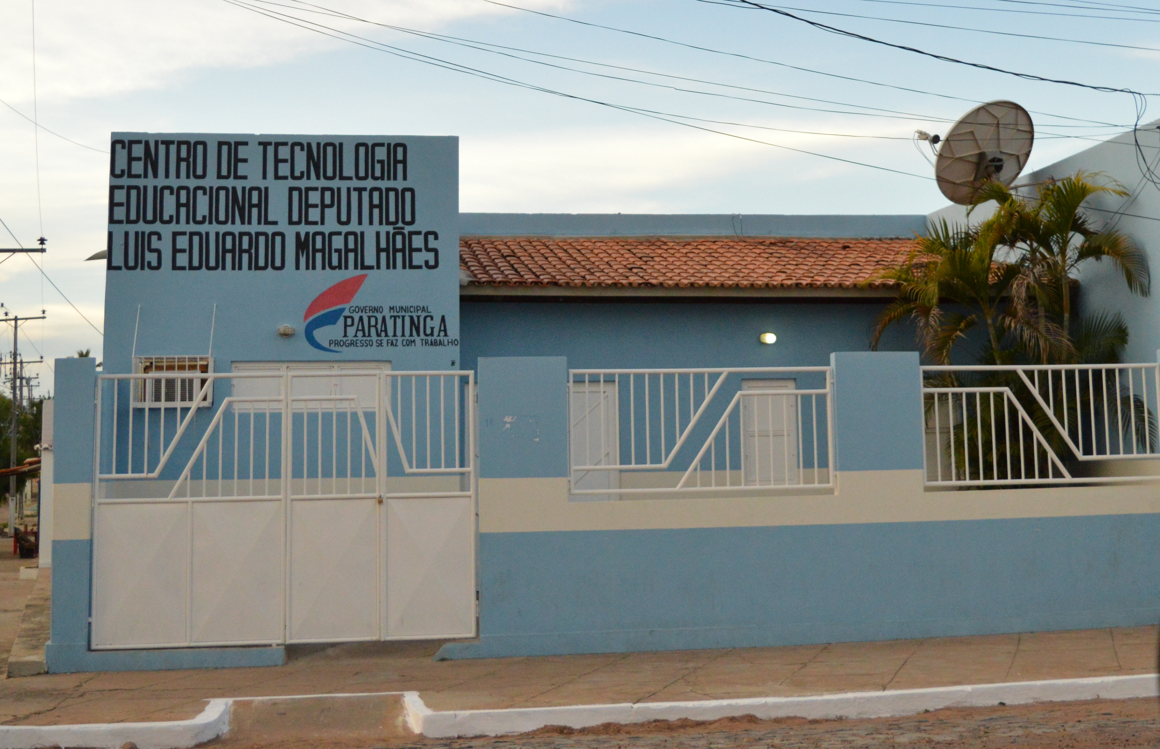 Vista do Centro de Tecnologia Educacional deputado Luís Eduardo Magalhães, localizado na cidade brasileira de Paratinga. Foto de 16 de janeiro de 2017.